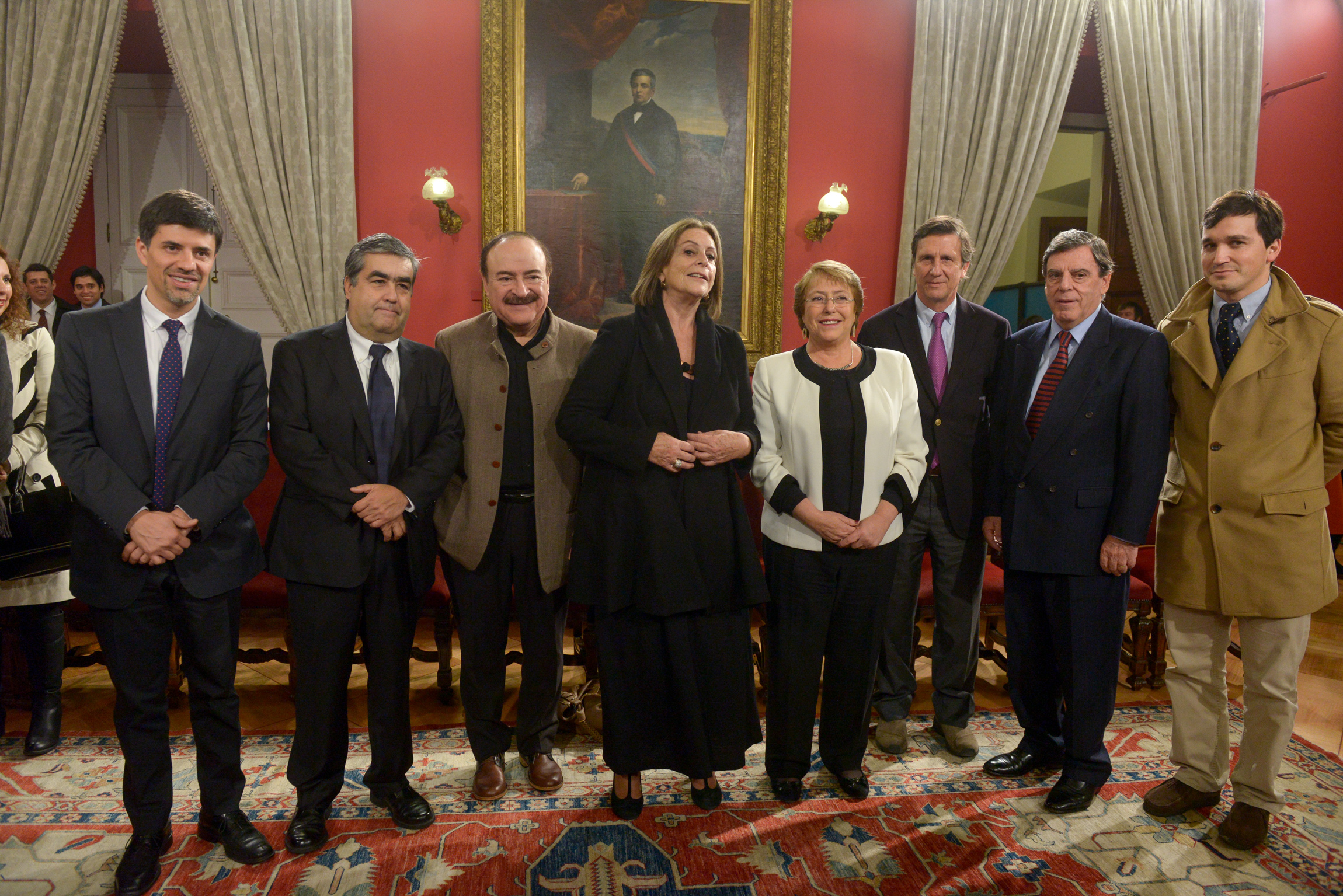 Ministro Marcelo Díaz firma Indicación Sustitutiva al Proyecto que moderniza TVN y crea Canal Cultural Educativo.